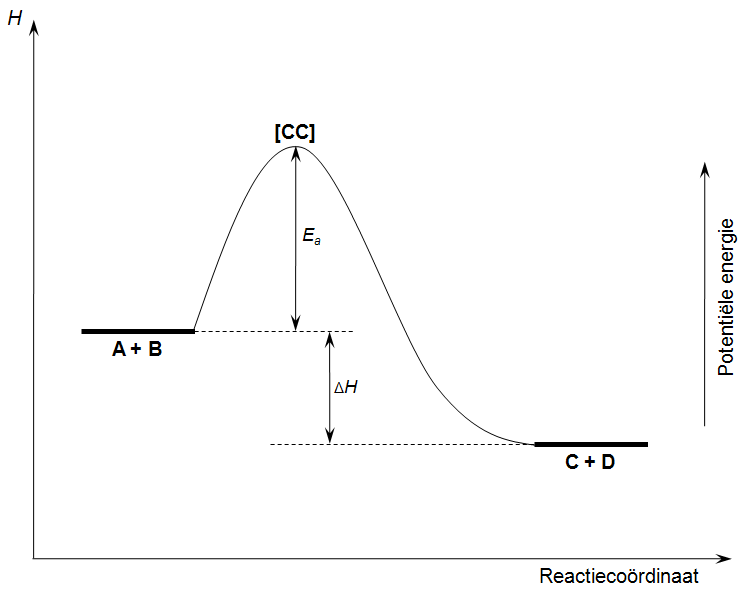 Reactieprofiel